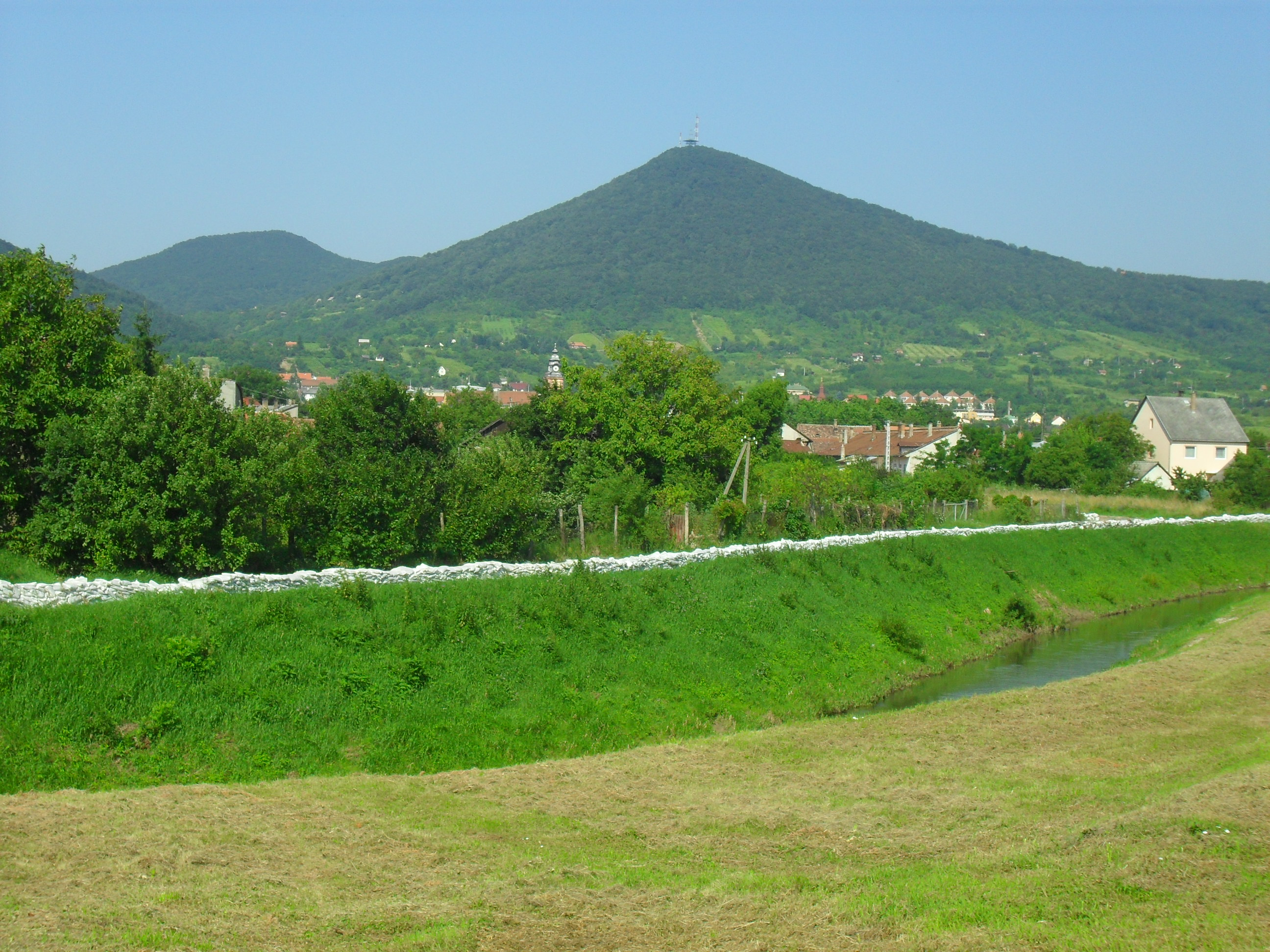 Újhely - a Ronyva-patak